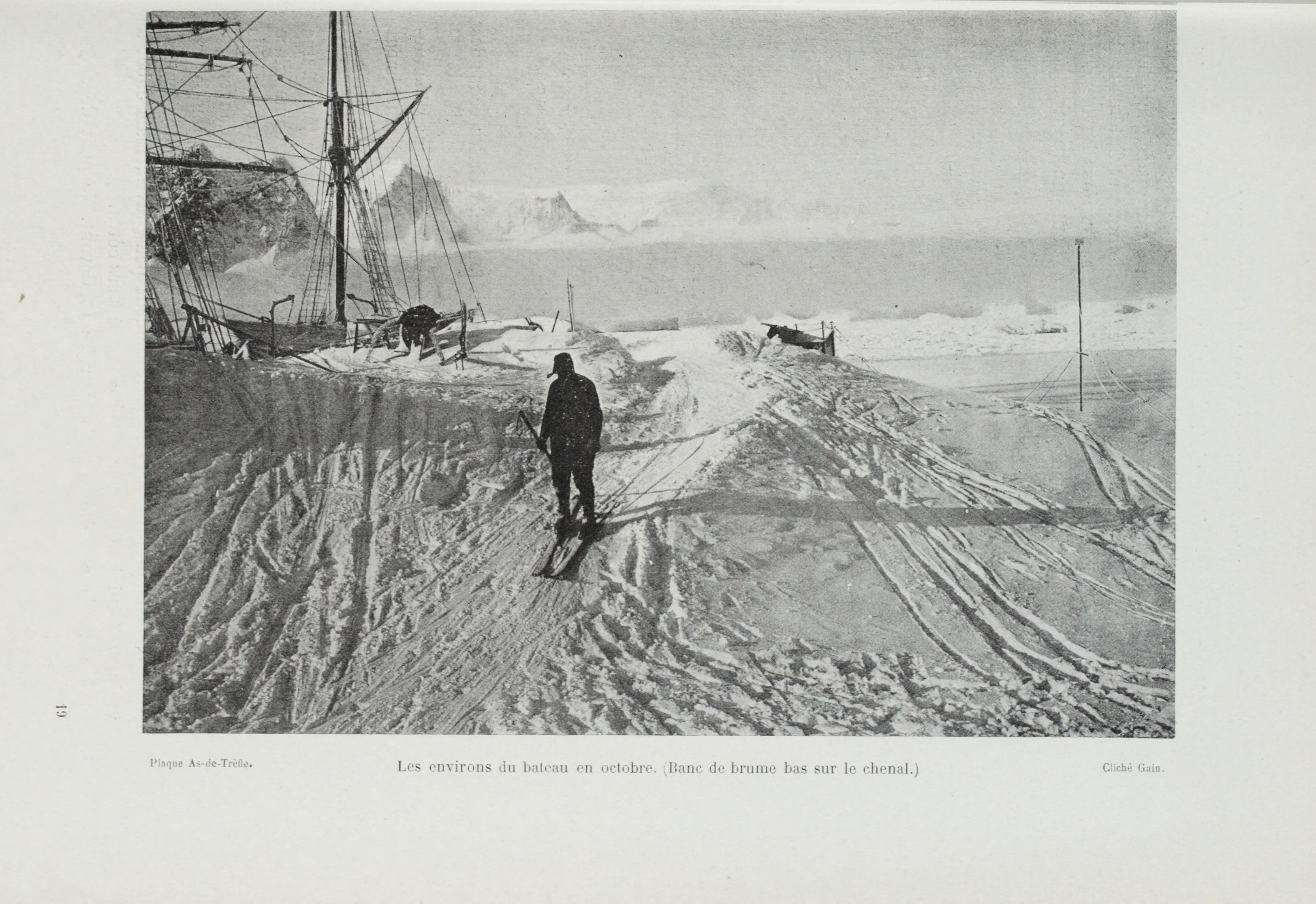 Le pourquoi-pas dans l'Antarctique : journal de la deuxieme expedition au Pole Sud, 1908-1910, suivi des rapports scientifiques des membres de letat-major preface de M. Paul Doumer.